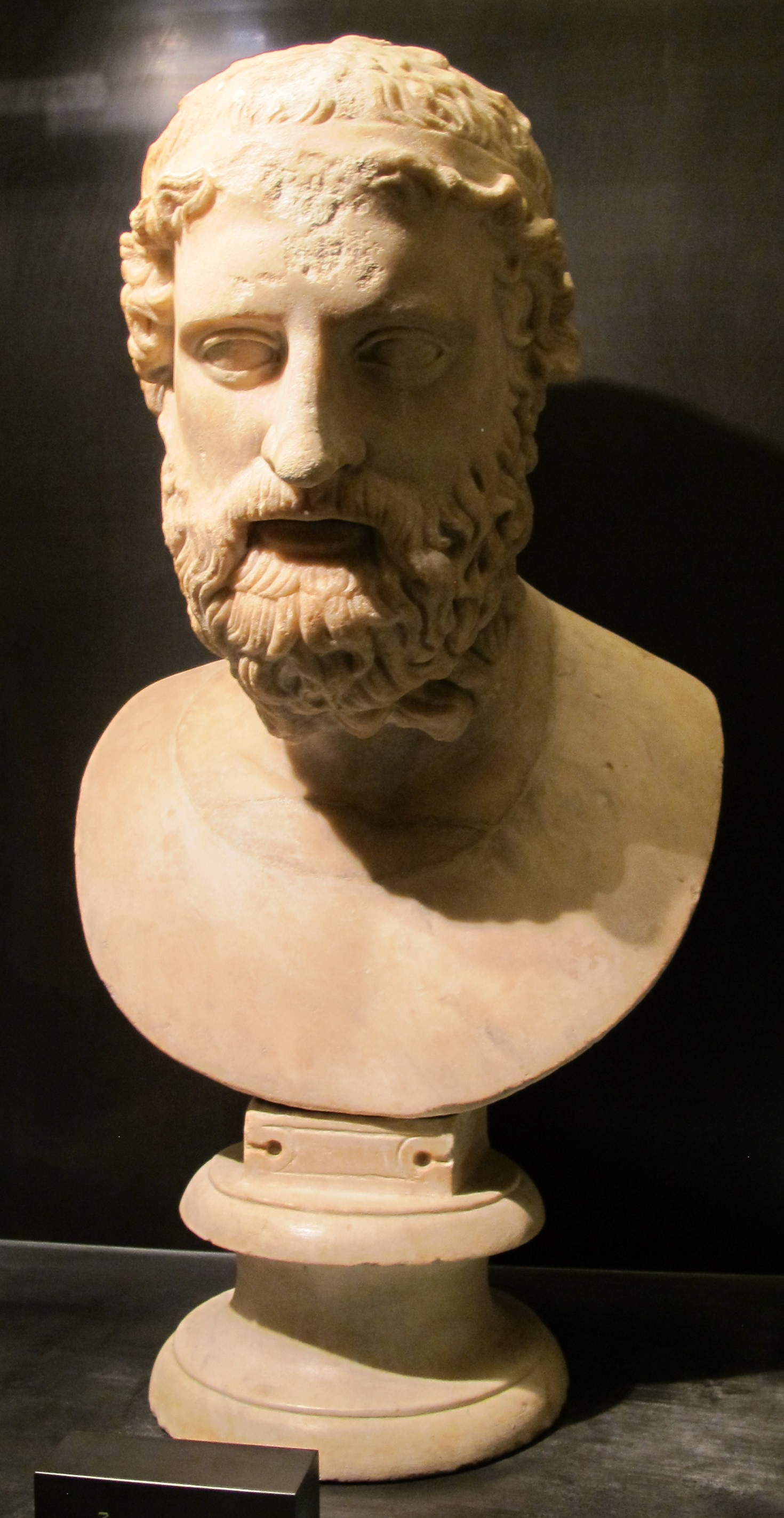 Museo dei Marmi, palazzo Medici-Riccardi, Firenze